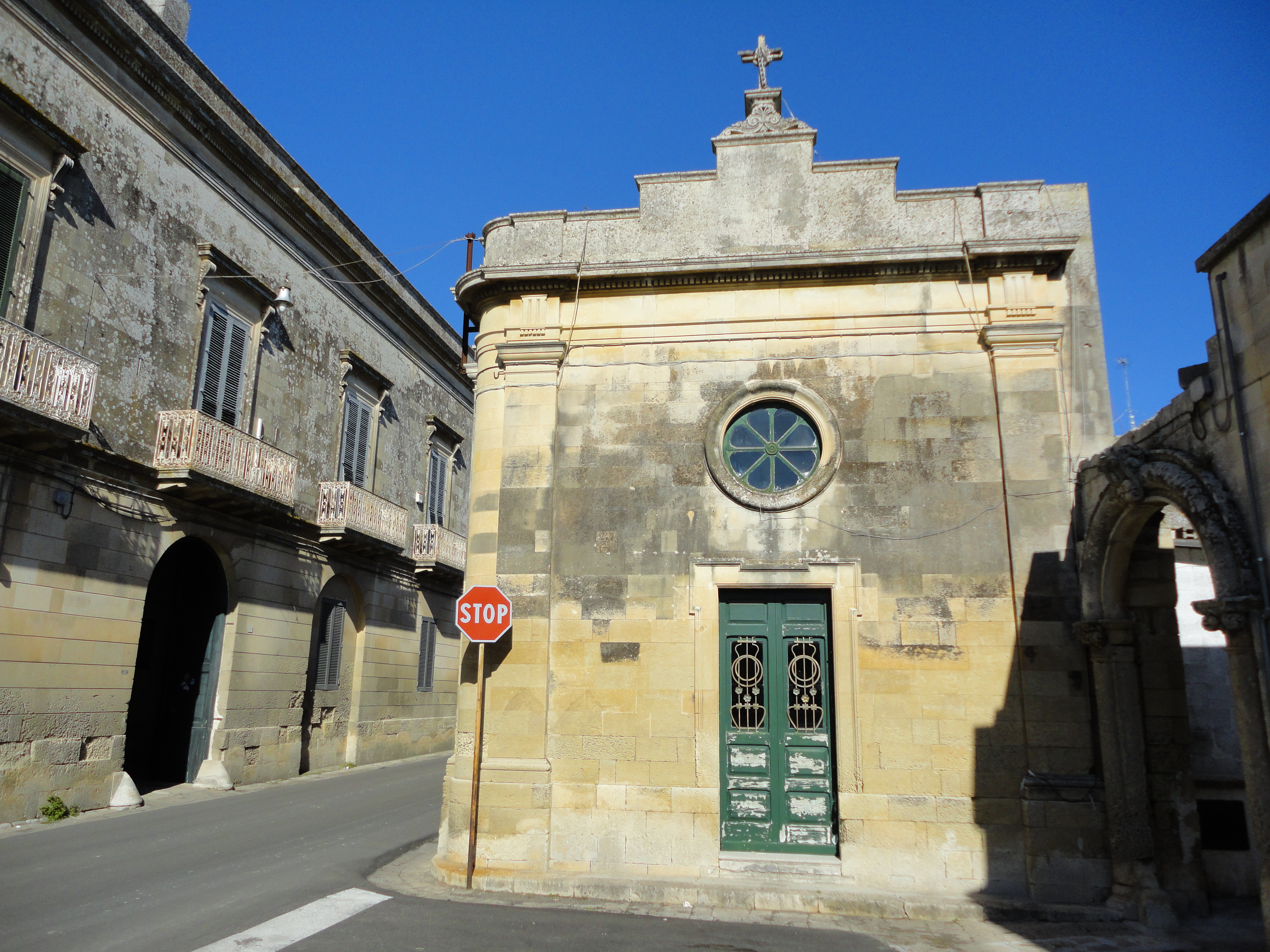 Cappella dell'Addolorata Castrignano de' Greci, Lecce